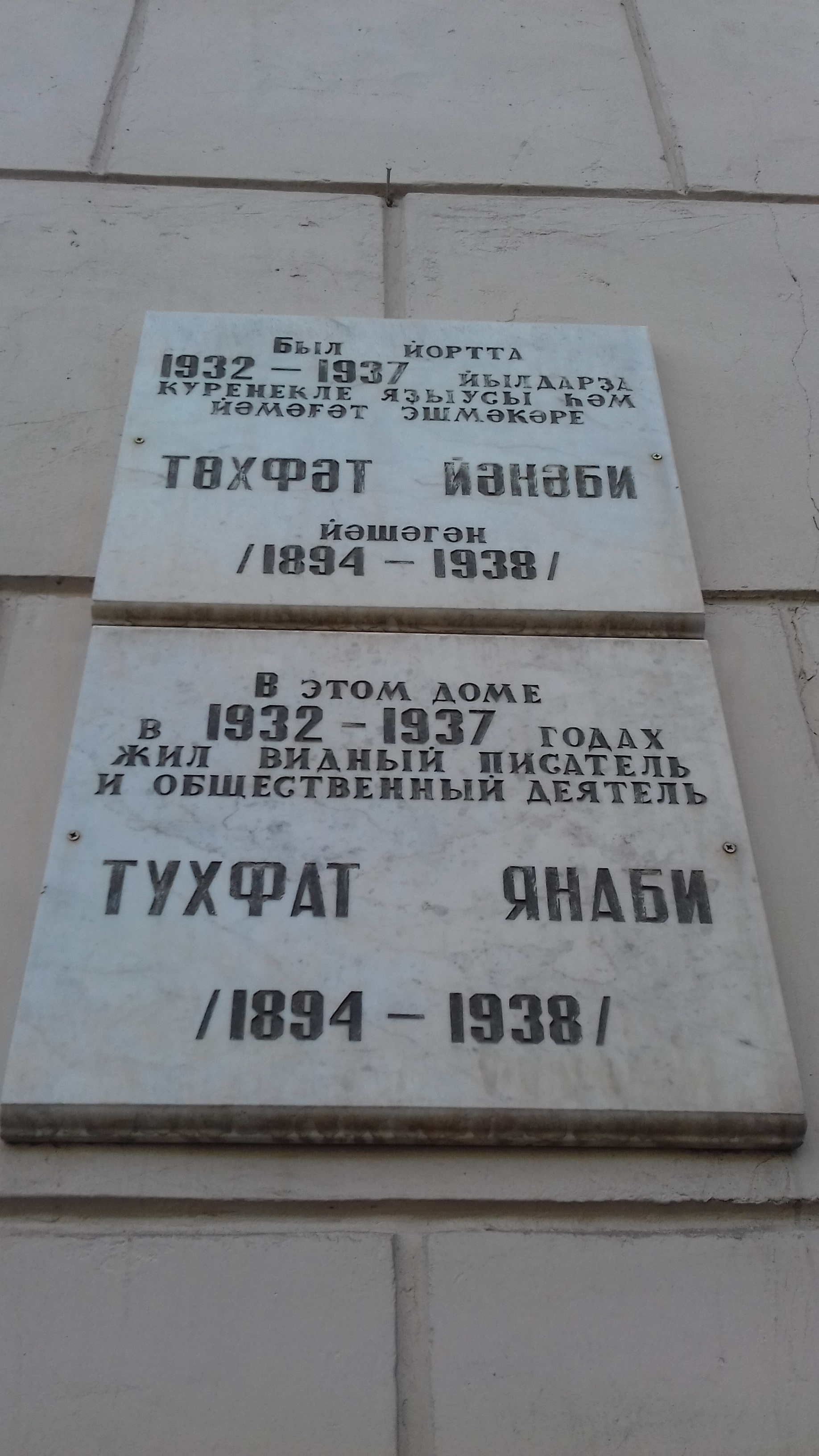 Мемориальная доска (Тухфат Янаби) на ул.К.Маркса 17/19 (Уфа)